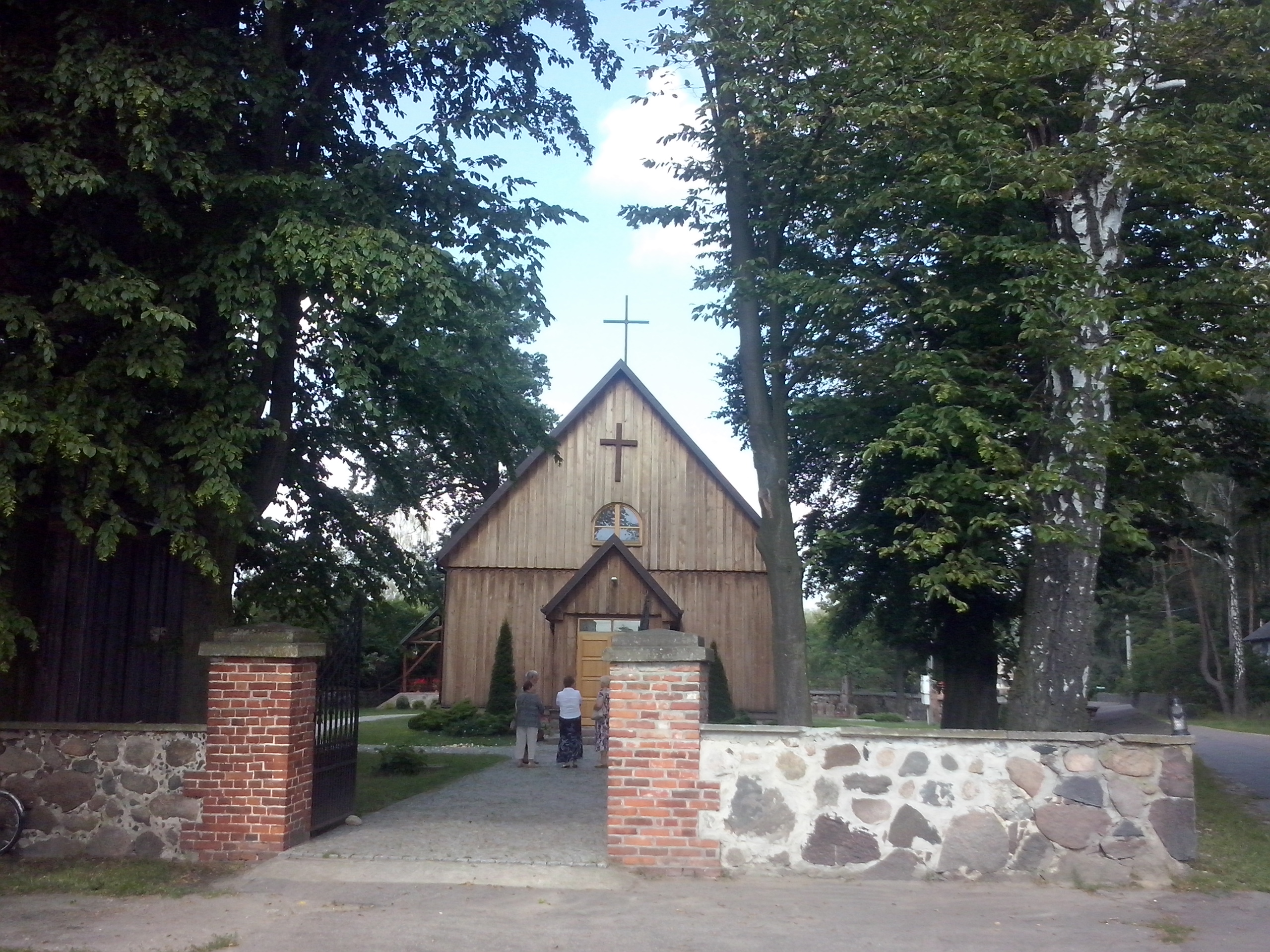 Sadykierz (gm. Obryte, pow. Pułtusk) - kościół Św. Rocha